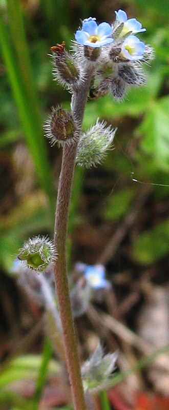 Beschreibung: Acker-Vergissmeinnicht (Myosotis arvensis (L.)) Fotograf: Darkone, 14. Mai 2005